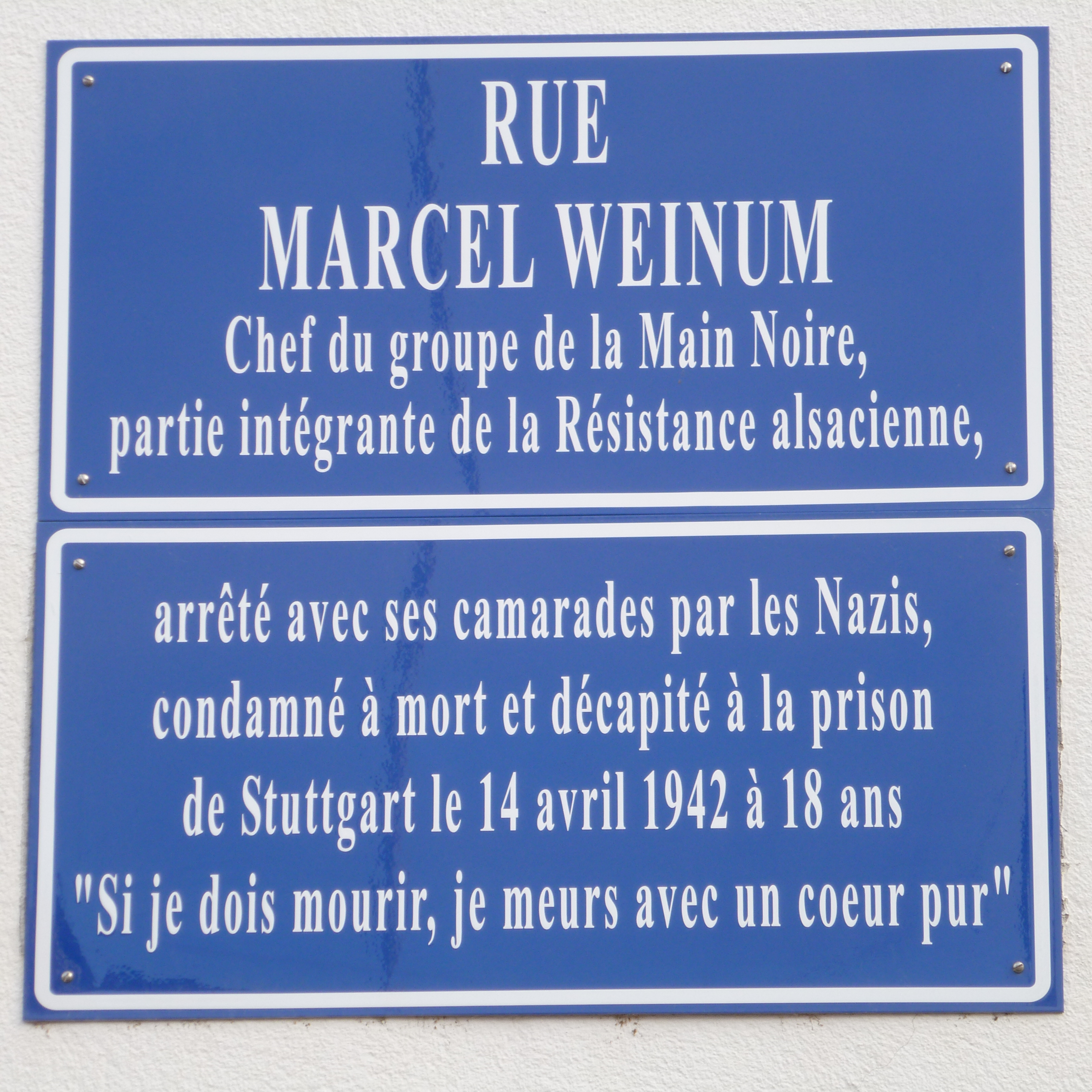 Plaque de la rue Marcel Weinum à Strasbourg, dans le quartier de Neudorf-NeufeldIl y a écrit : “ Rue Marcel Weinum, chef du groupe de la Main Noire, partie intégrante de la résistance alsacienne, arrêté avec ses camarades par les Nazis condamné à mort et décapité à la prison de Stuttgart le 14 avril 1942 à 18 ans. "Si je dois mourir je meurs avec un cœur pur" ”